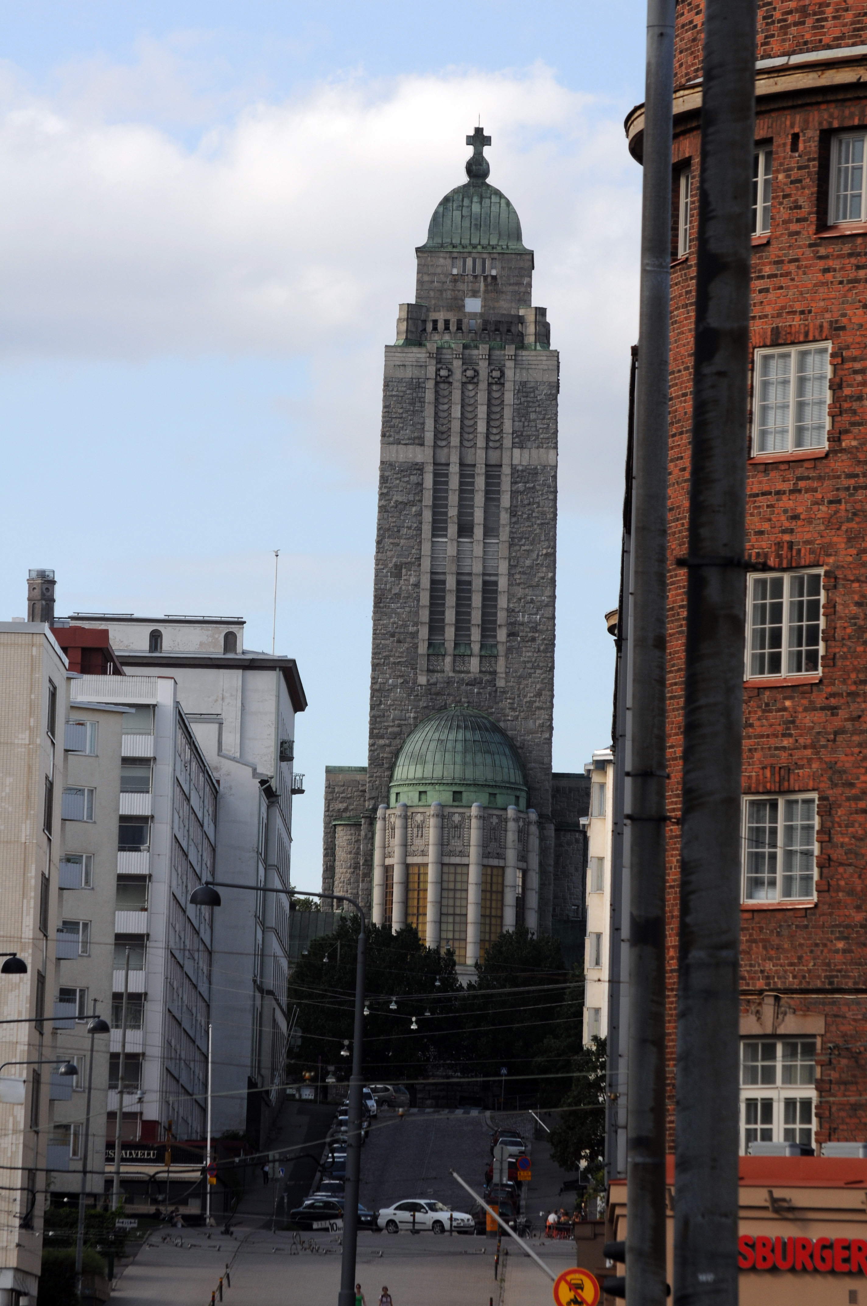 Helsinki